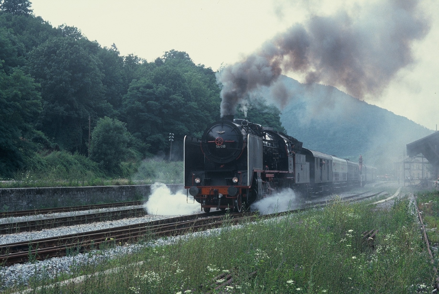 JŽ 06 na postaji Most na Soči